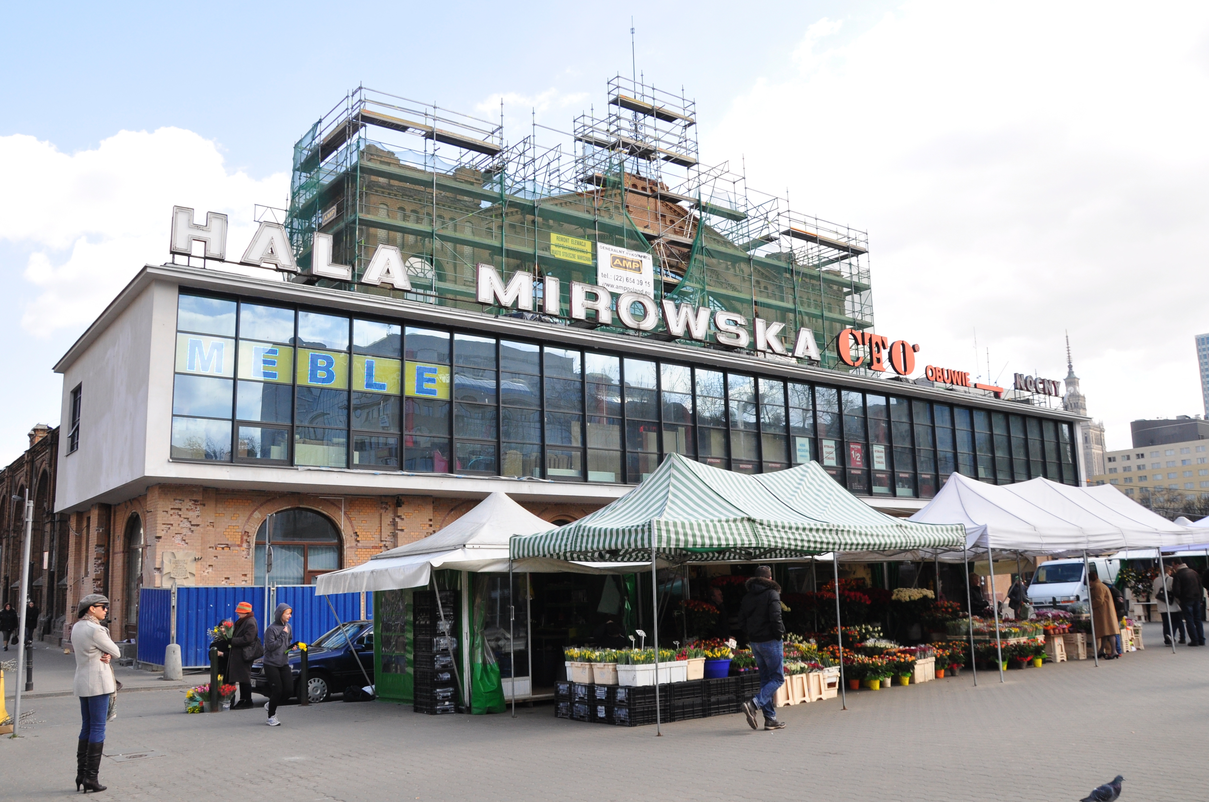 Warschau Mirow Hallen